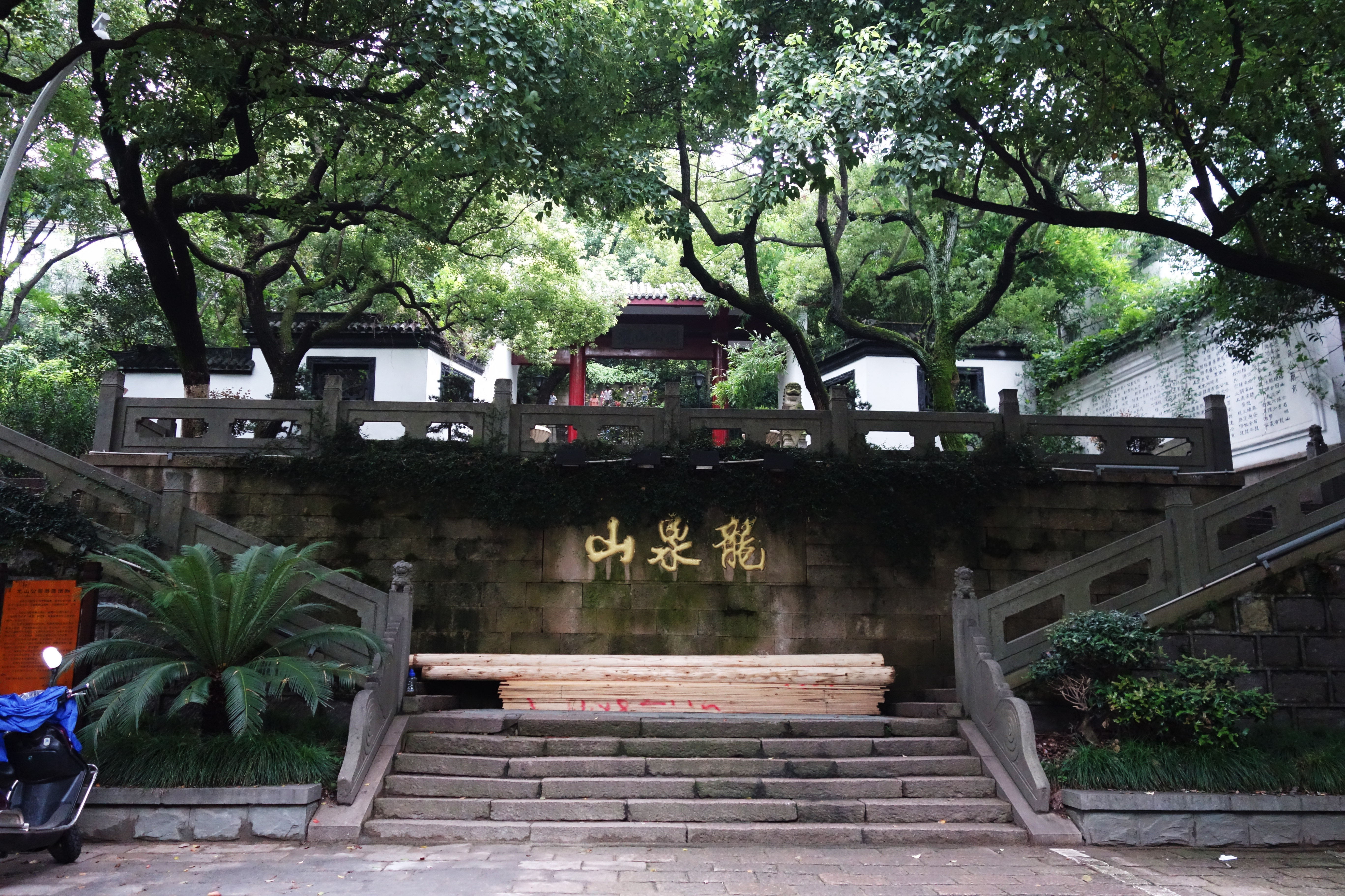 余姚龙泉山入口